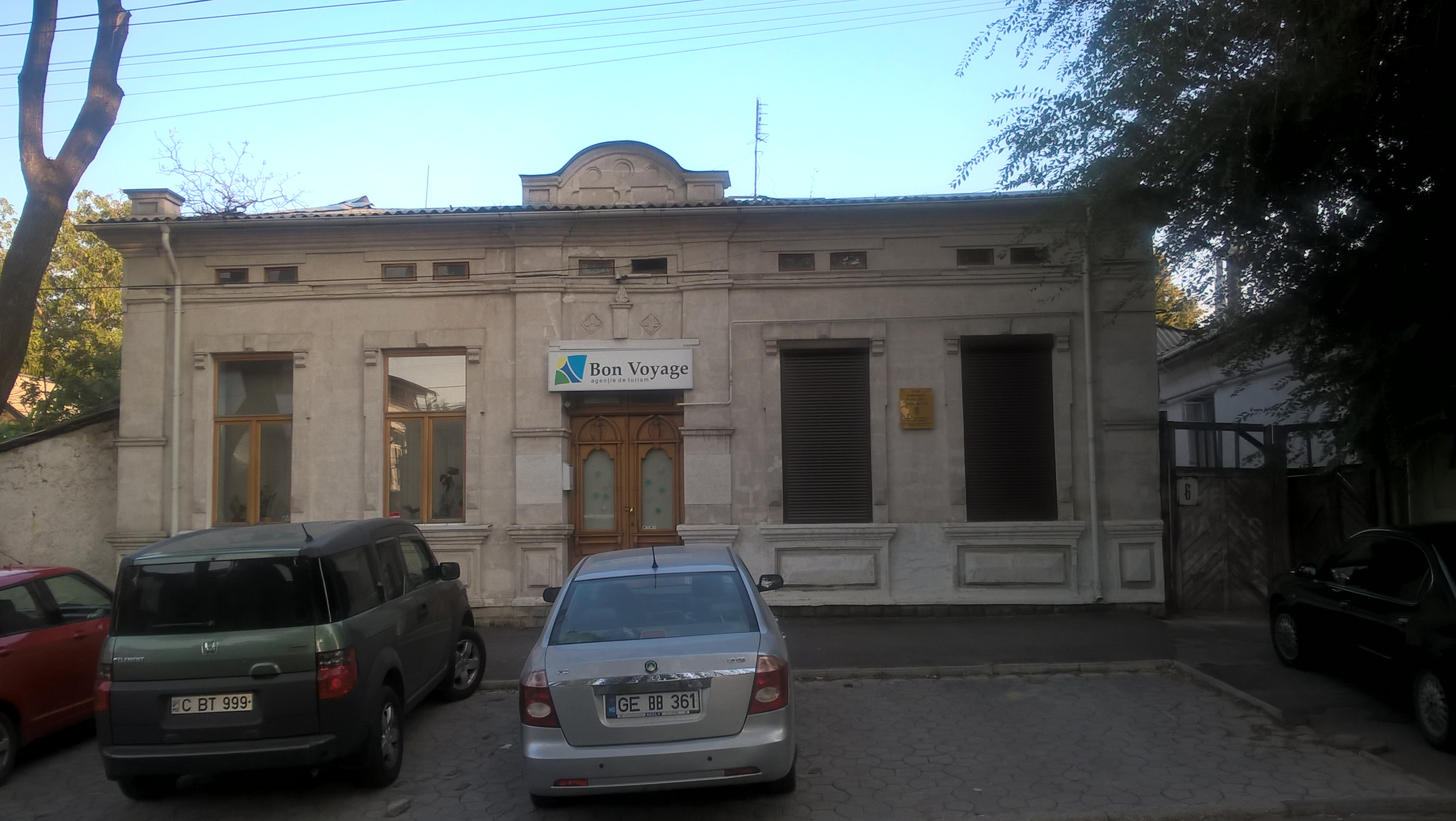 Budynek, w którym w 1917/1918 r. mieściło się kierownictwo zbrojnych oddziałów bolszewików w Kiszyniowie . Obecnie ul. Sergheia Lazo